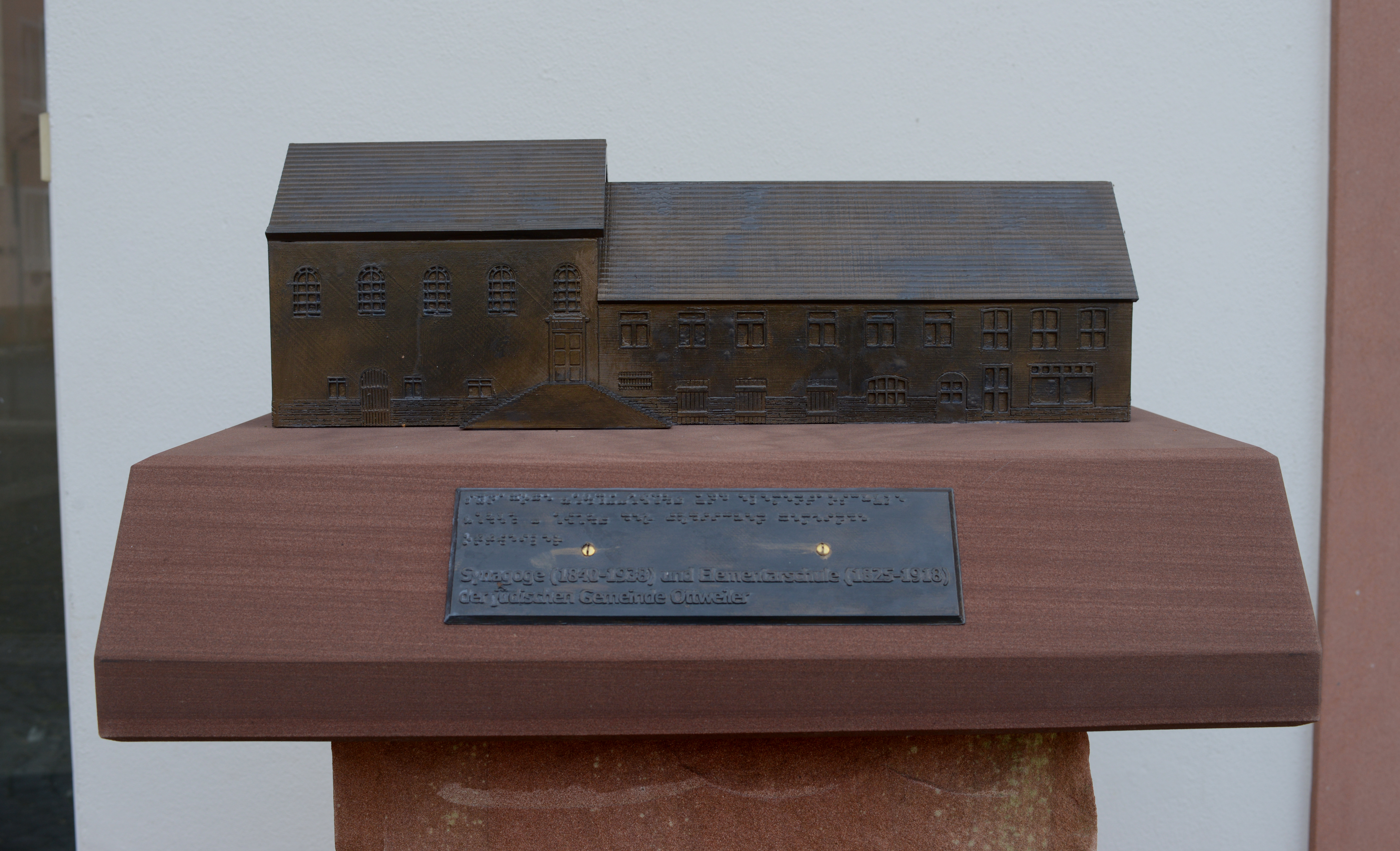 Das detailgetreue Modell der ehemaligen Synagoge und der jüdischen Elemantarschule in Ottweiler wurde am 9. November 2018 der Öffentlichkeit übergeben. Standort: Schlossplatz 4 in Ottweiler, Saarland/ Deutschland (2018).